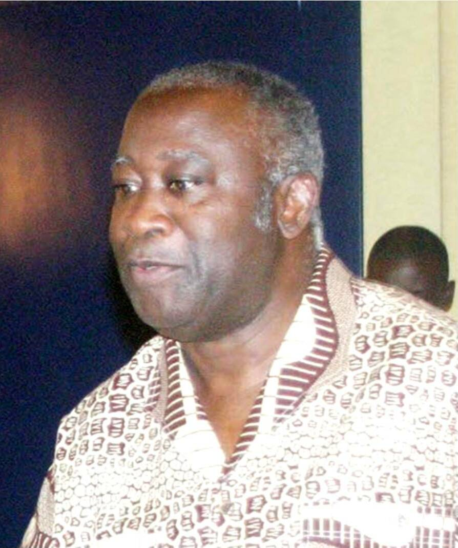 Laurent Gbagbo, Président de la République (Côte d'Ivoire)